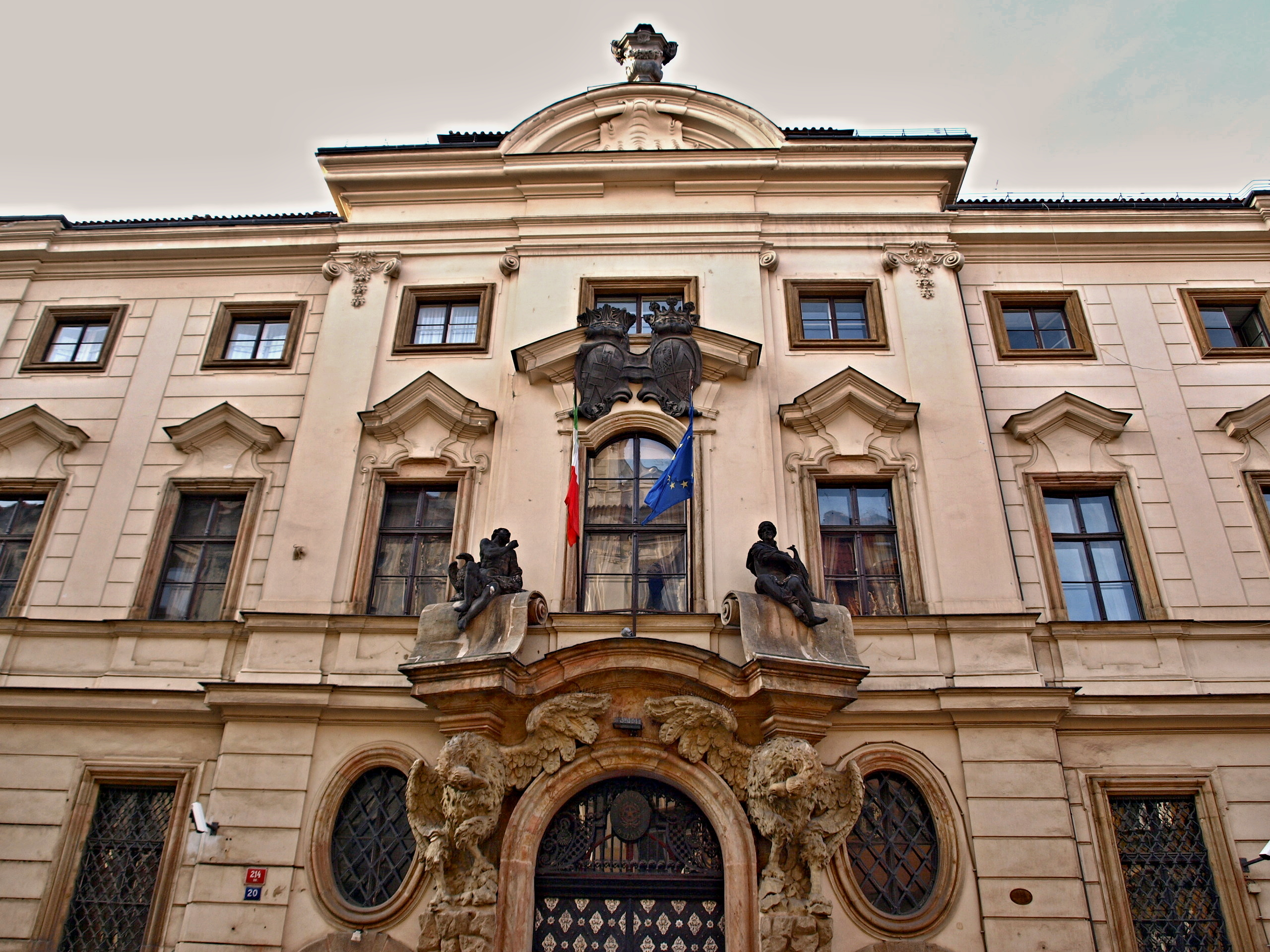 Kolovratský palác (Praha, Nerudova) - čelo